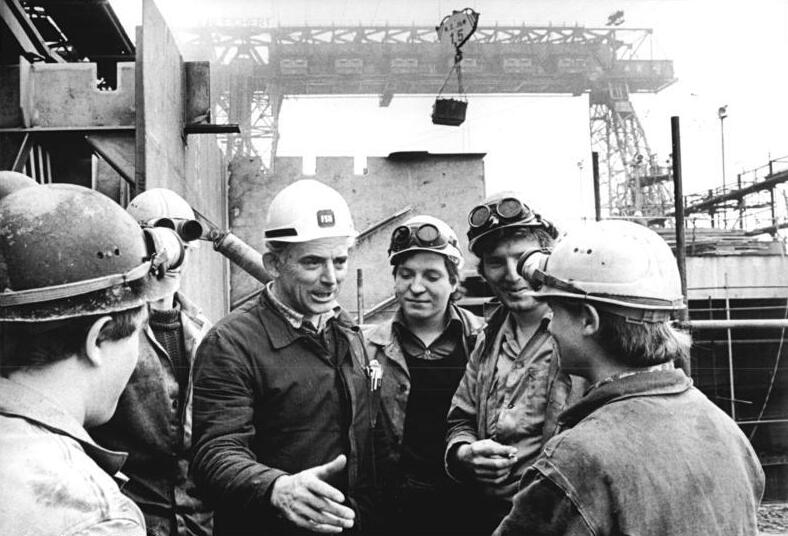 Warnemünde, Warnow-Werft , Schiffbaumeister ADN-ZB Sindermann 5.5.1986 Rostock: Abgeordnete- Der Schiffbaumeister Horst Weidemann (M.) wurde in diesen Tagen von den Mitgliedern seines Kollektivs der Hellingmontage in der Warnow-Werft Warnemünde erneut als Abgeordneter für die Volkskammer vorgeschlagen. Von seiner Partei (SED) nominiert, hatte der erfahrene Schiffbauer in der jetzt zu Ende gehenden Legislaturperiode aktiv im Volkskammer-Ausschuß für Industrie, Bauwesen und Verkehr mitgearbeitet. Mit seinem Kollektiv von rund 25 Schiffbauern will Horst Weidemann dazu beitragen, daß alle echt für dieses Jahr geplanten Stapelläufe der Warnow-Werft pünktlich erfolgen können. Vor allem bei der Kiellegung und dem Bau des ersten Vollcontainerschiffes der "Saturn"-Klasse wollen die Schiffbauer um den 52-jährigen Abgeordneten zu den Schrittmachern der Helling gehören.